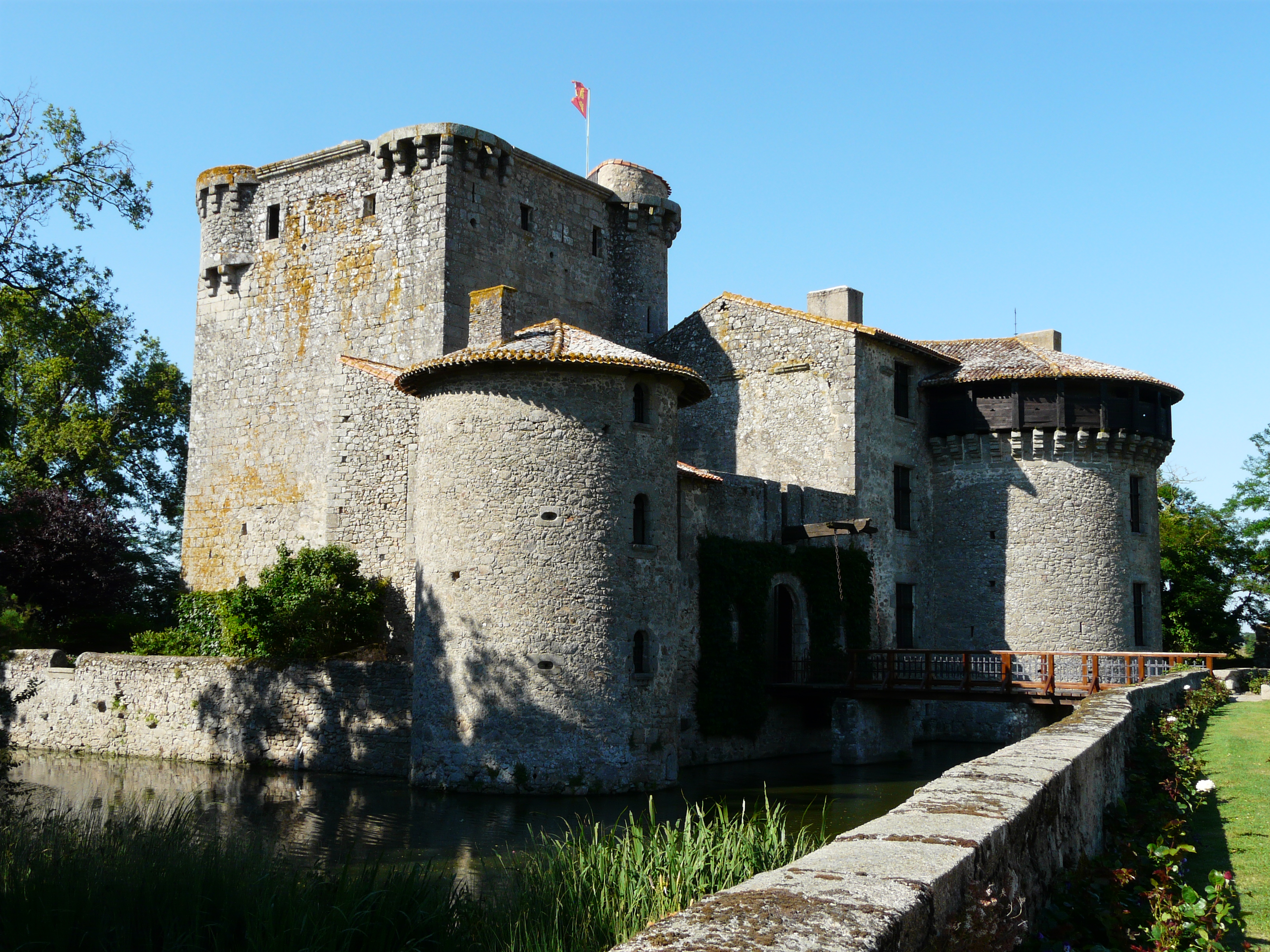 Le château de Tennessus, Amailloux, Deux-Sèvres, France